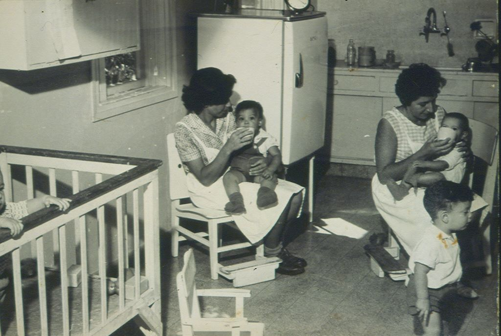 Kibbutz Gaash בית ילדים בקיבוץ געש